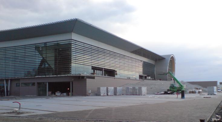 Dvorana Gradski vrt u Osijeku za vrijeme gradnje.